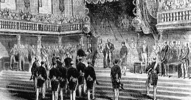 napoleon III